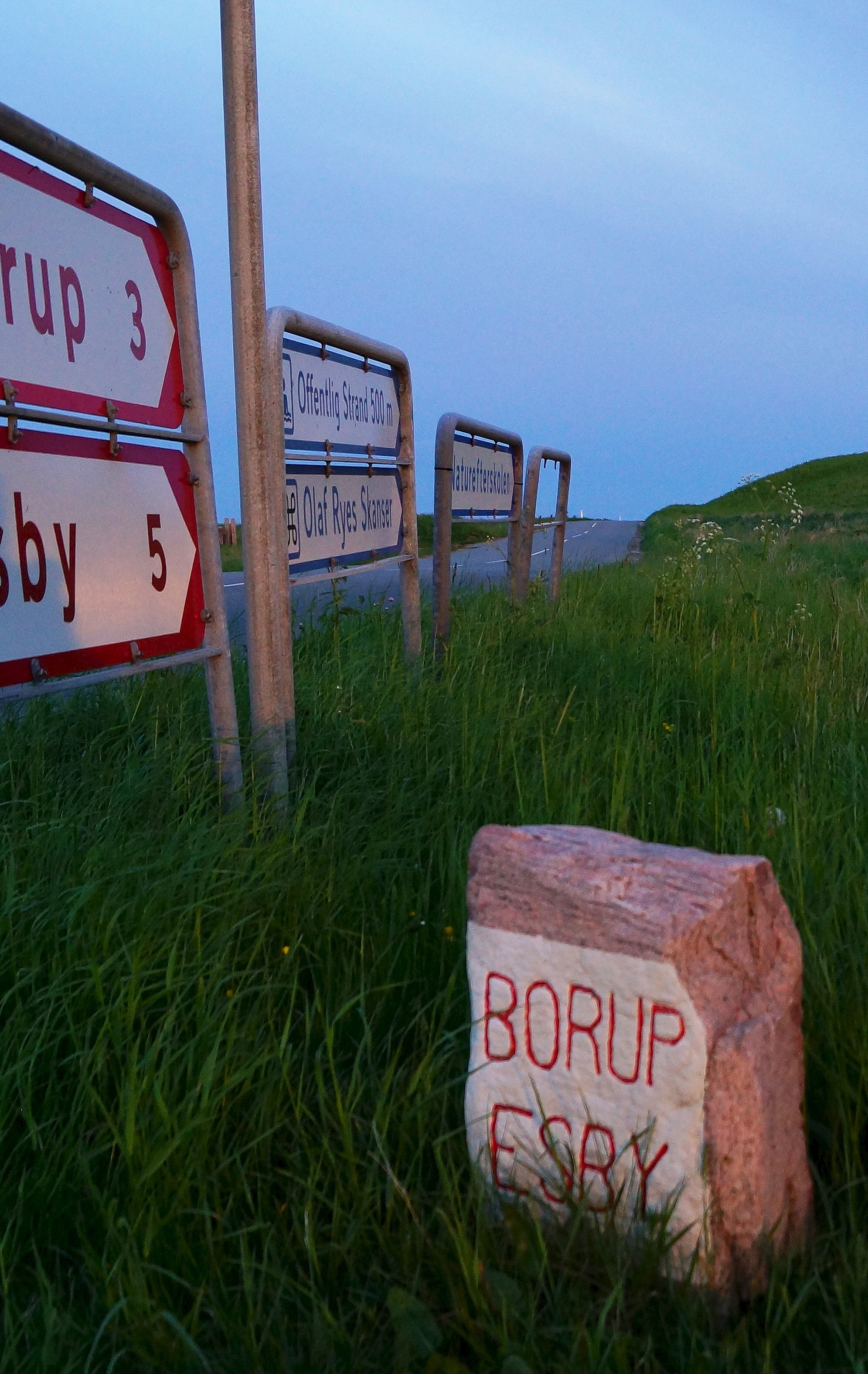 Vejvisersten ved Begtrup Vig og Dragsmur 2